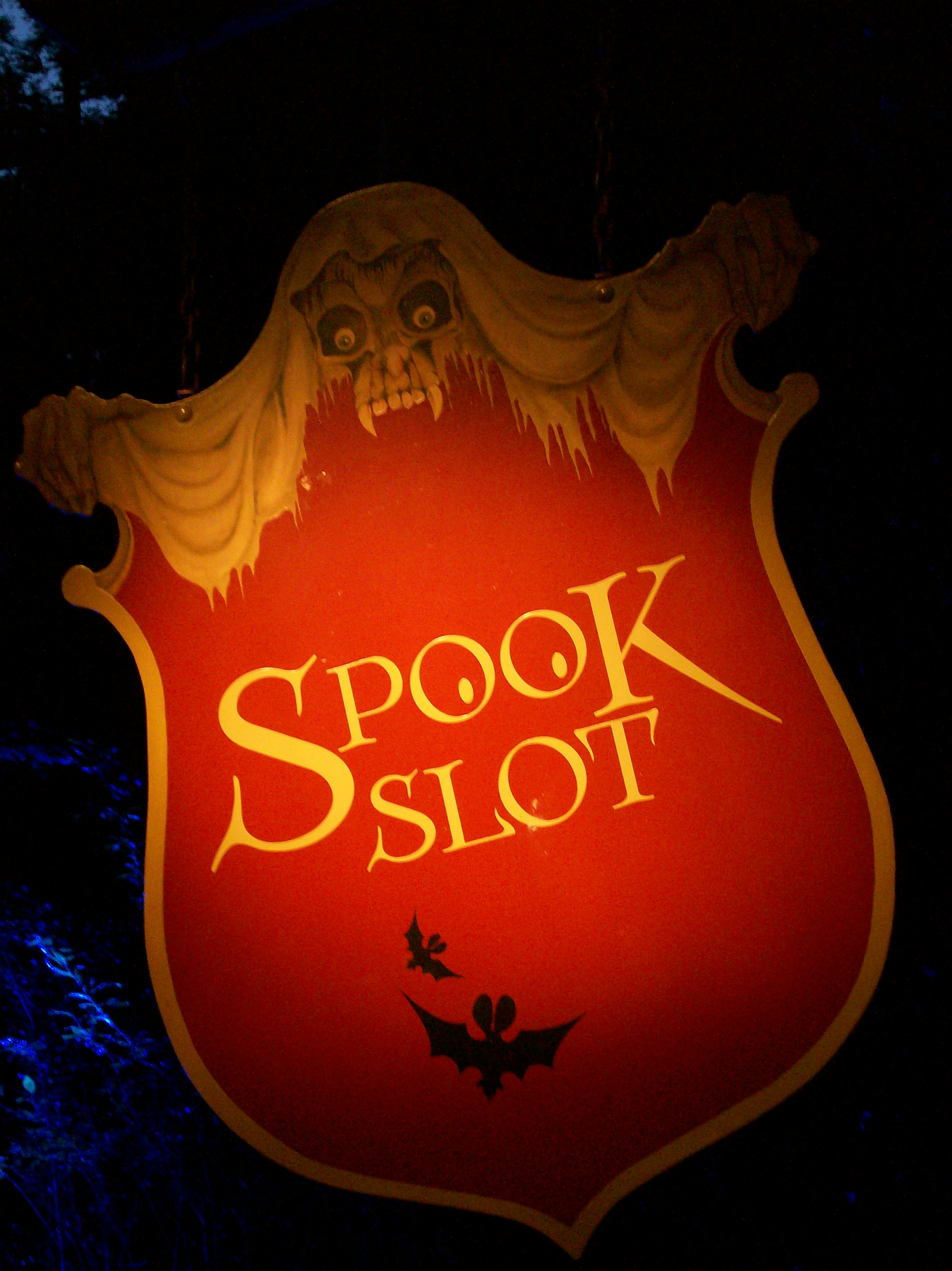 Panneau du Spookslot